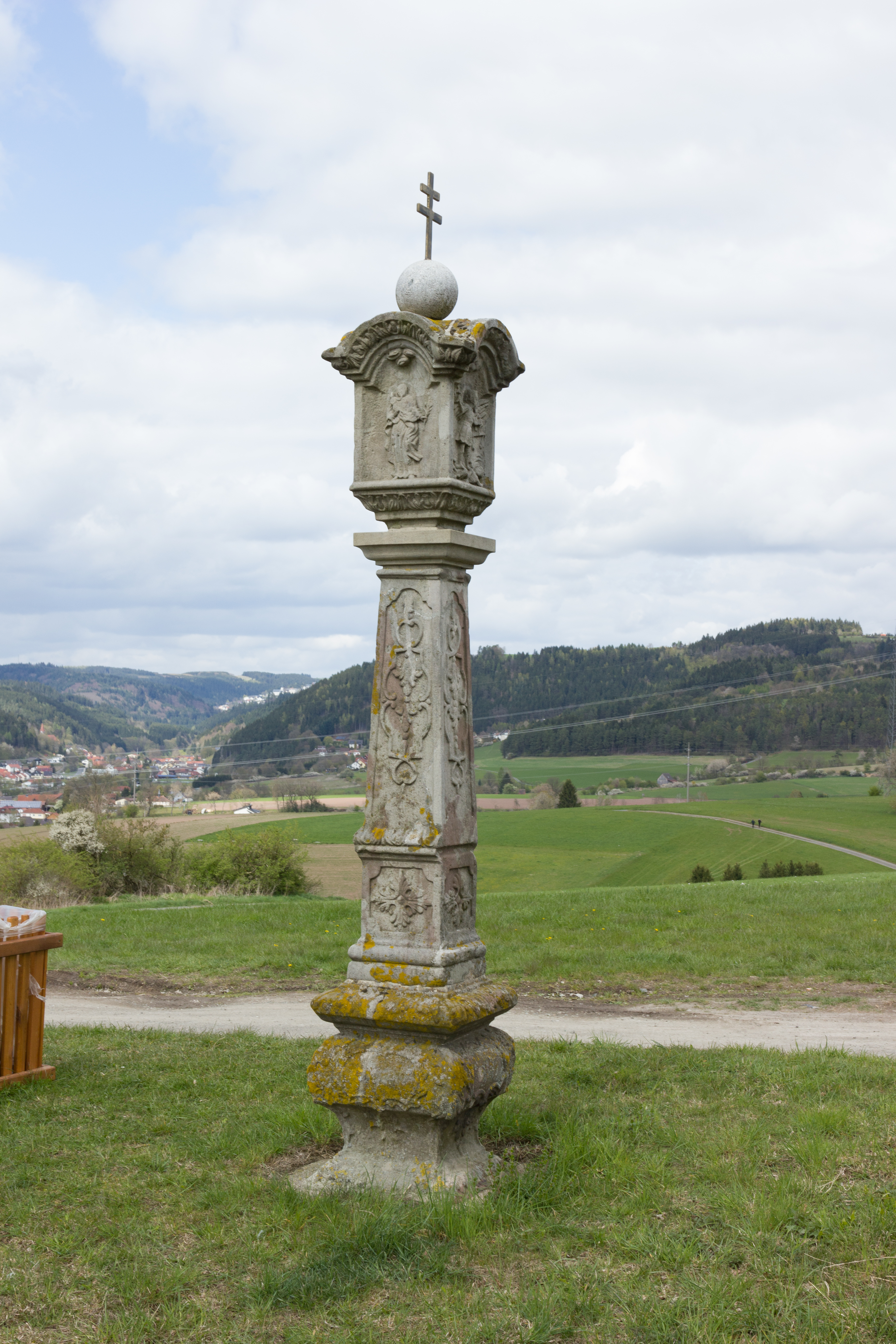 Sandsteinpfeiler 1780 zwischen Rennesberg und Friesen in Kronach